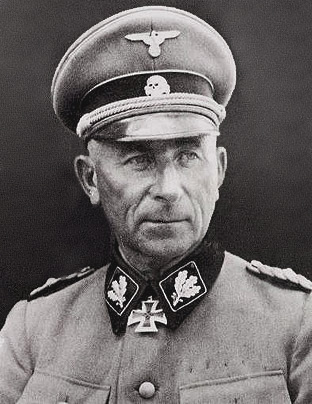 Waffen-SS General Paul Hausser immediateley after arrest in 1945 (see removed medal decoration).